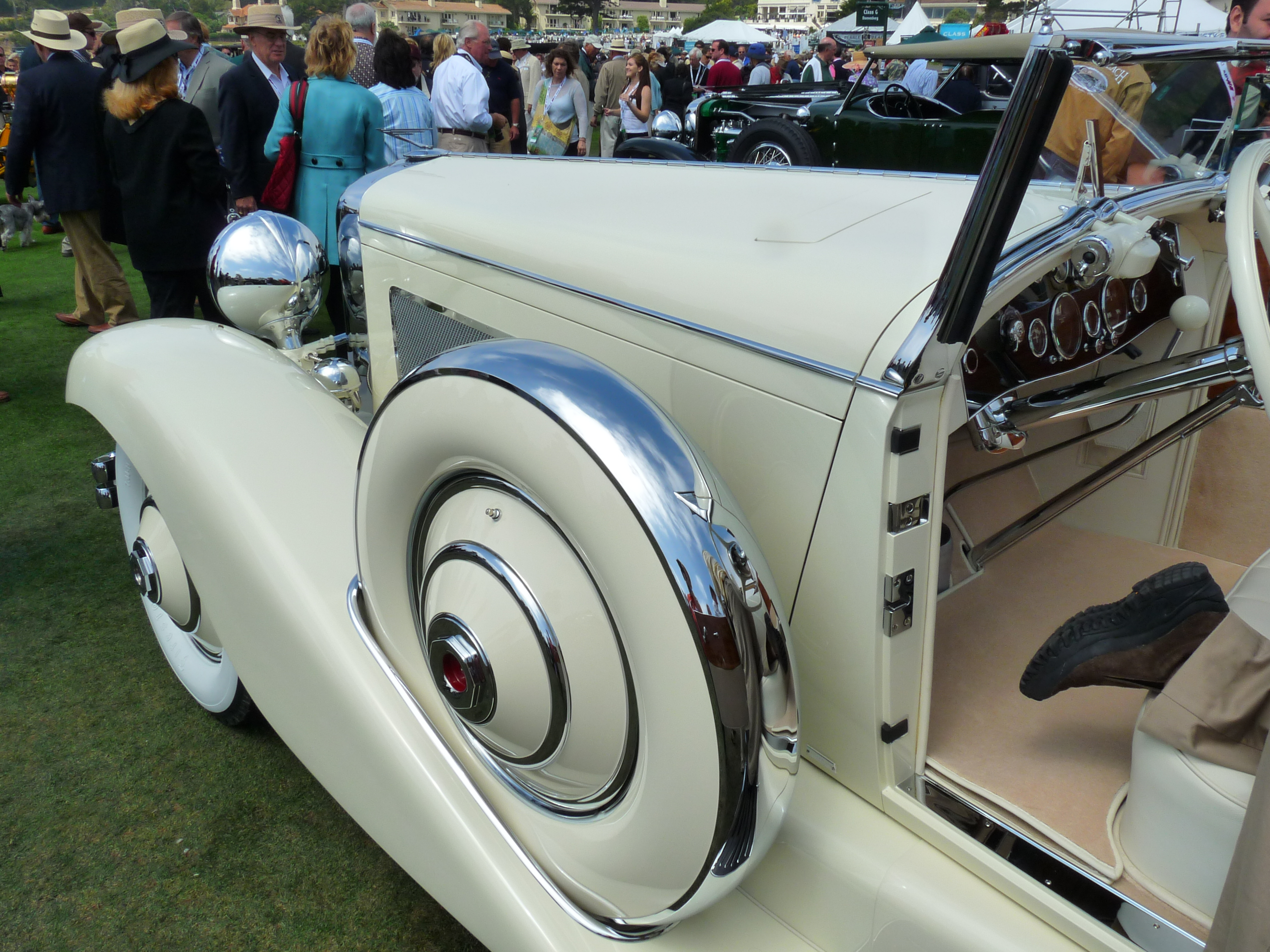 1932 Duesenberg J Bohman & Schwartz Convertible Coupe